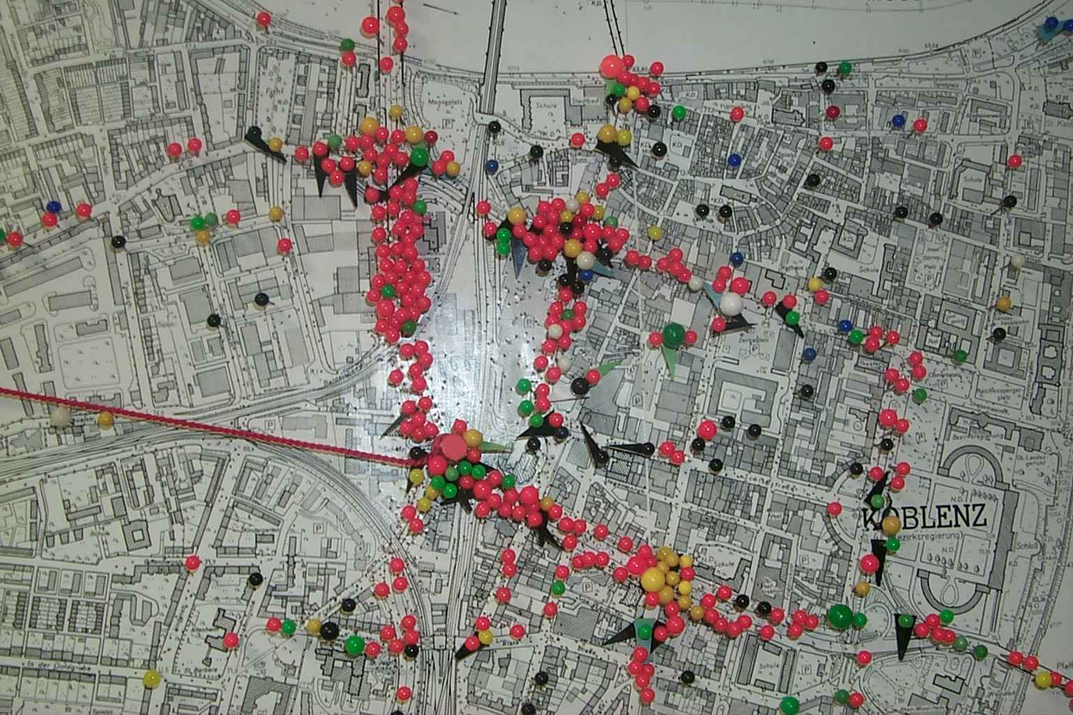 Unfalltypen-Steckkkarte (Ausschnitt).